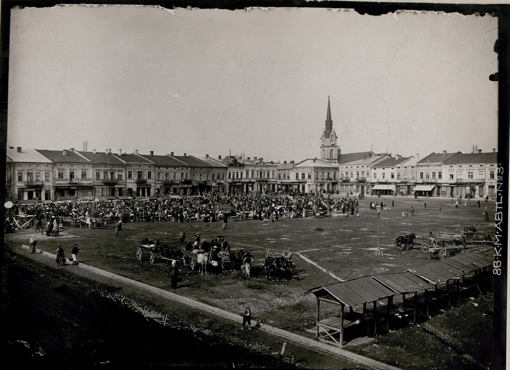 Ringplatz in Stryj.